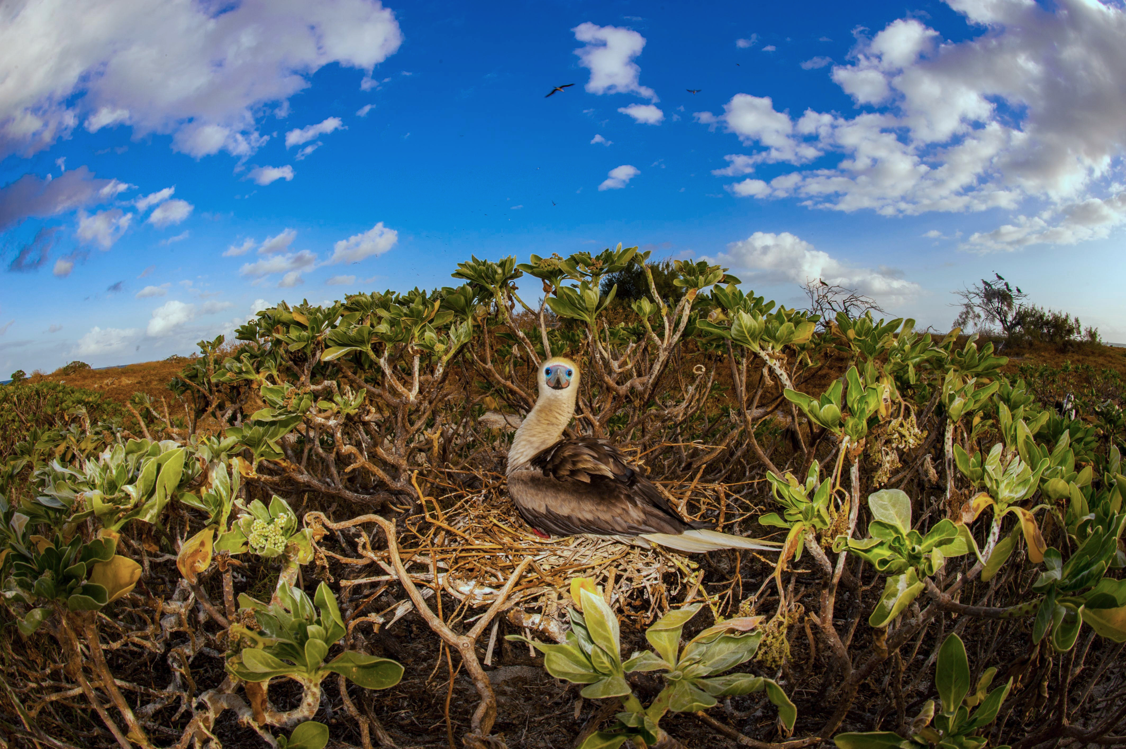 Ile Longue sur les récifs de Chesterfield en Nouvelle-Calédonie. Les fous à pieds rouges Sula sula nichent dans les arbres en bord de mer.